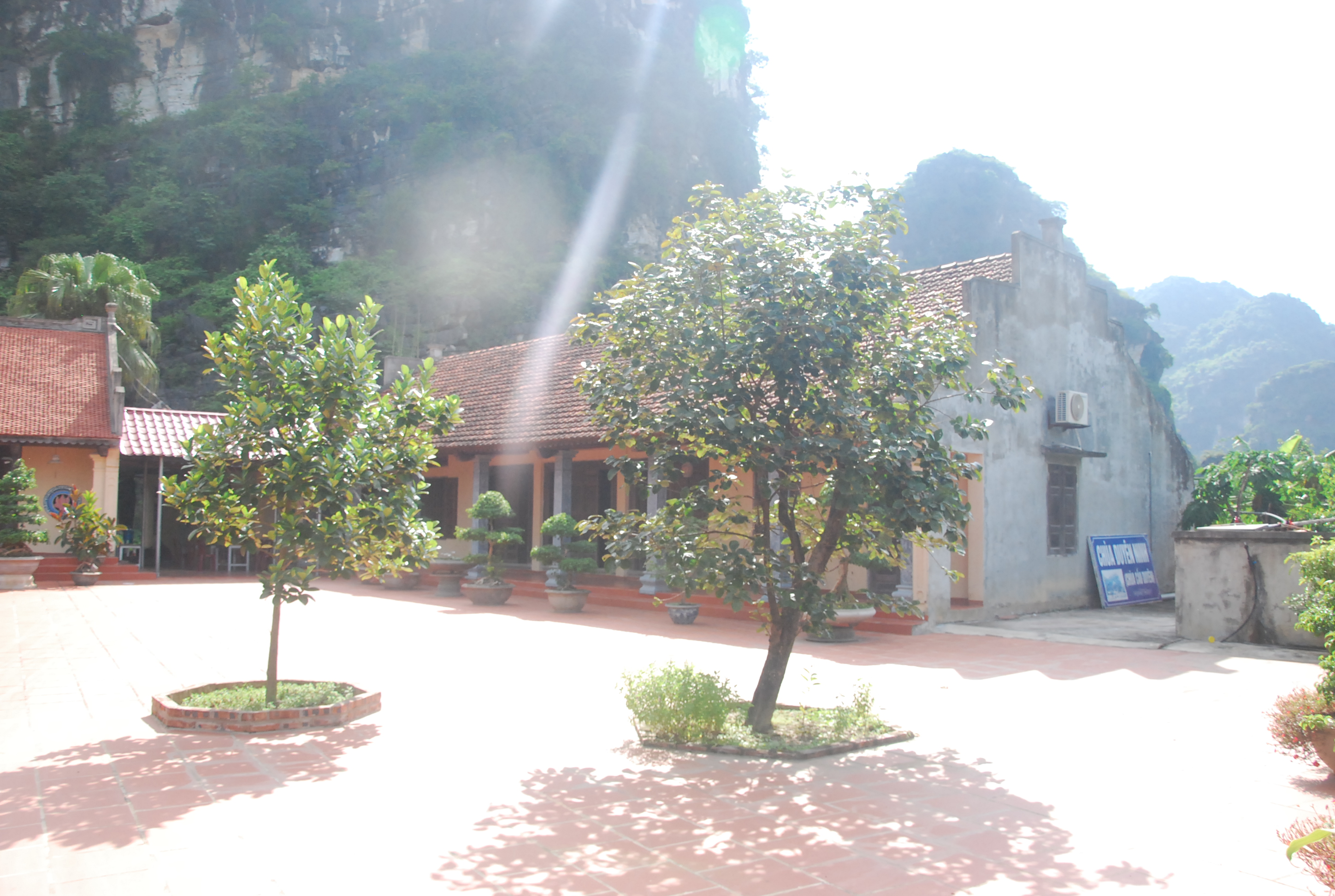 Chùa Duyên Ninh trong Quần thể di tích Cố đô Hoa Lư ở Ninh Bình